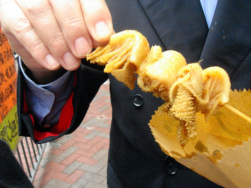 Hong Kong street lou meiHong Kong street lou mei